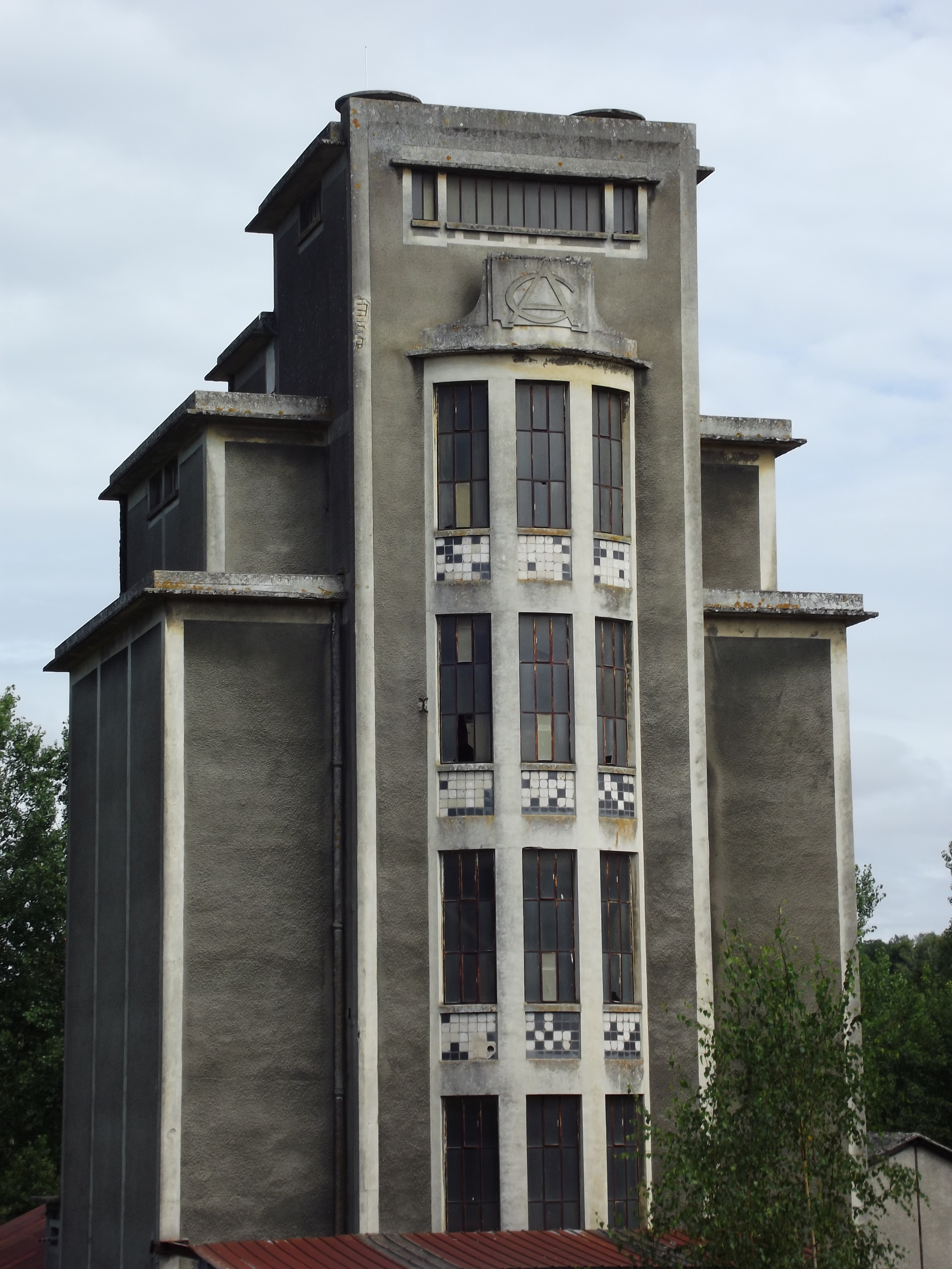 L'ancien silo d'inspiration Art déco avec ses lignes droites et son style épuré. Situé rue Saint-Waast.